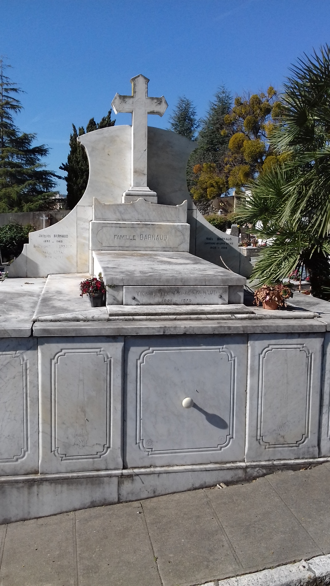 cimetière rabiac antibes